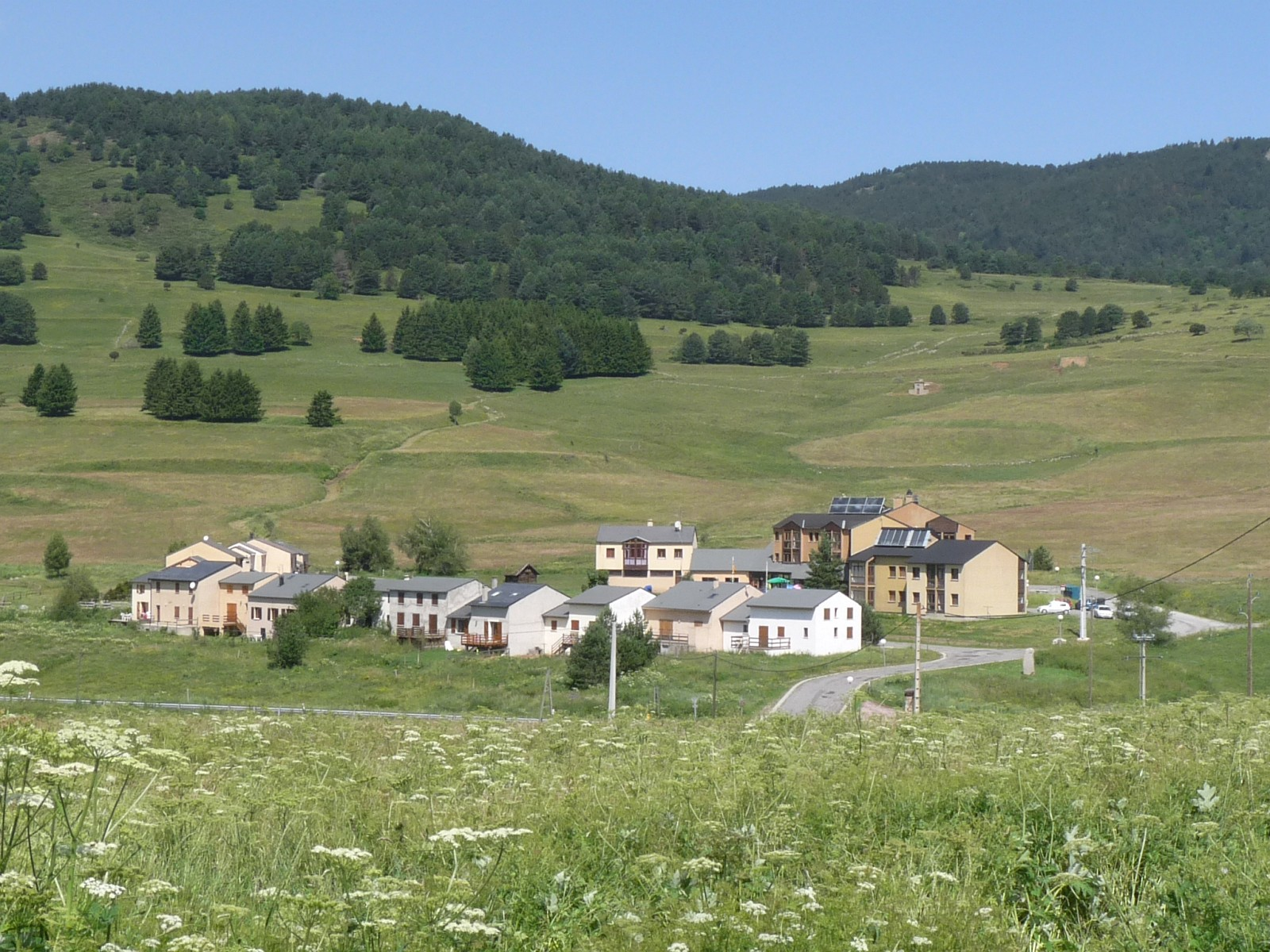 Puyvalador et le chemin Vauban (ancienne voie royale), Pyrénées-Orientales, France